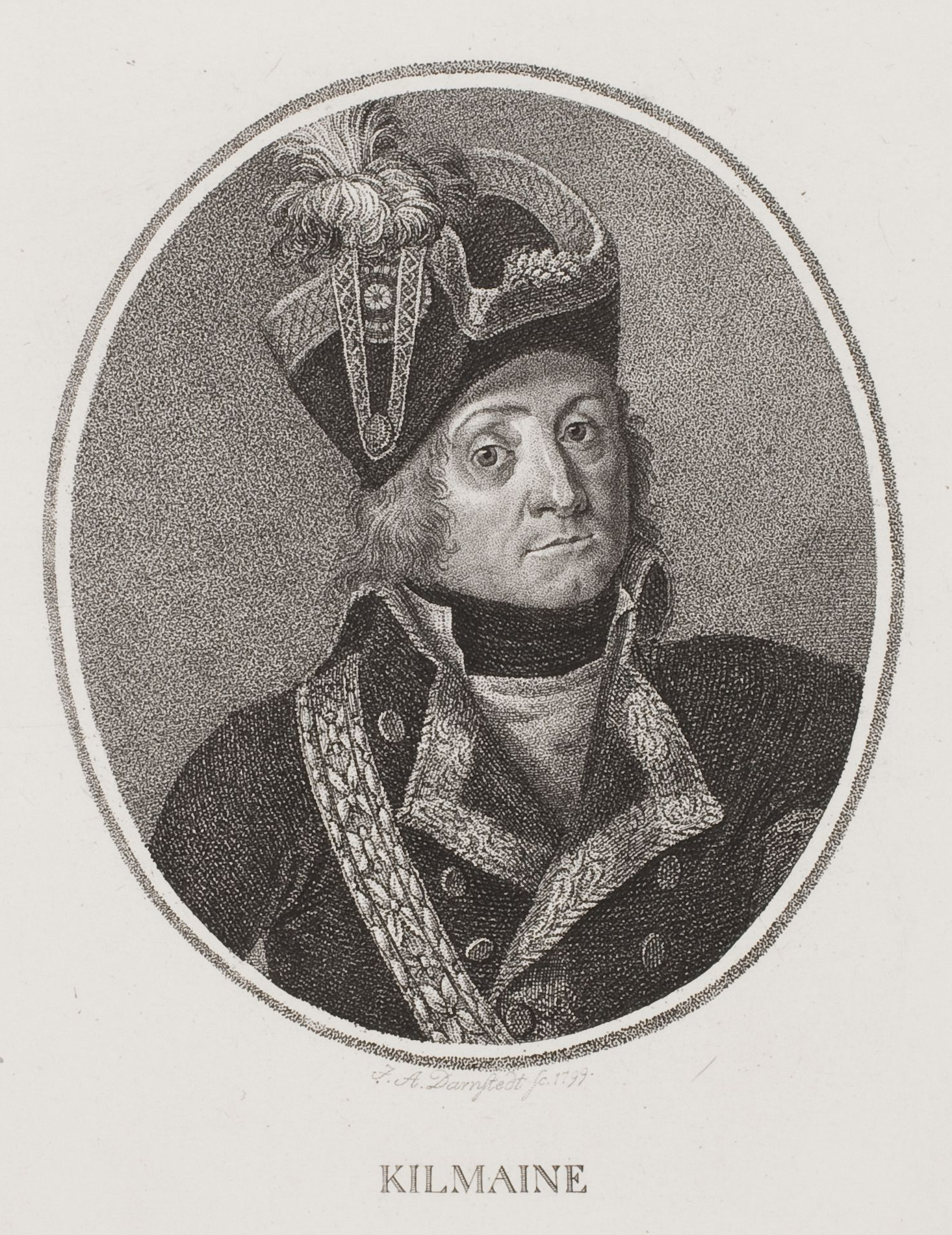 Charles Edward Saul Jennings Kilmaine; Punktierstich, gestochen von Johann Adolph Darnstedt Wolfenbüttel, Herzog August Bibliothek, Inv.-Nr. A 11023